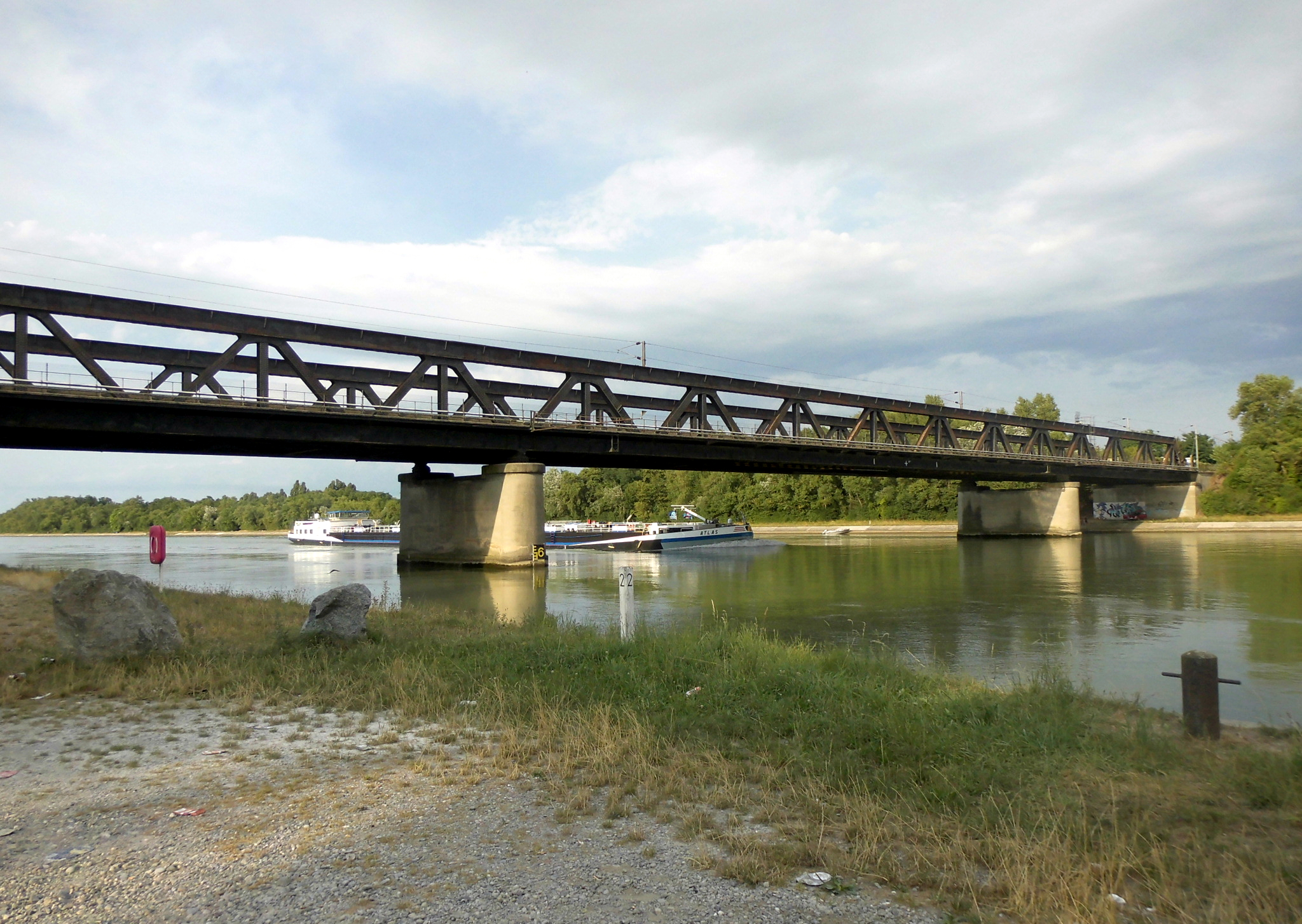 Chalampé, Pont sur le Grand canal d'Alsace